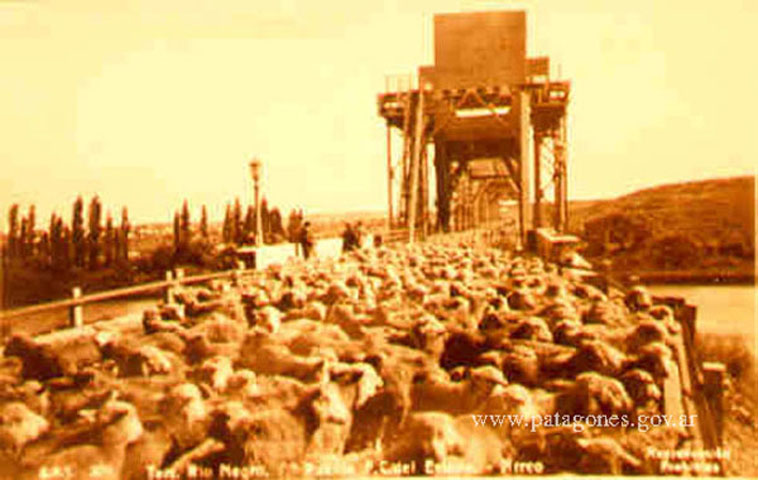 Inauguración delPuente Ferrocarretero, Viedma-Patagones.